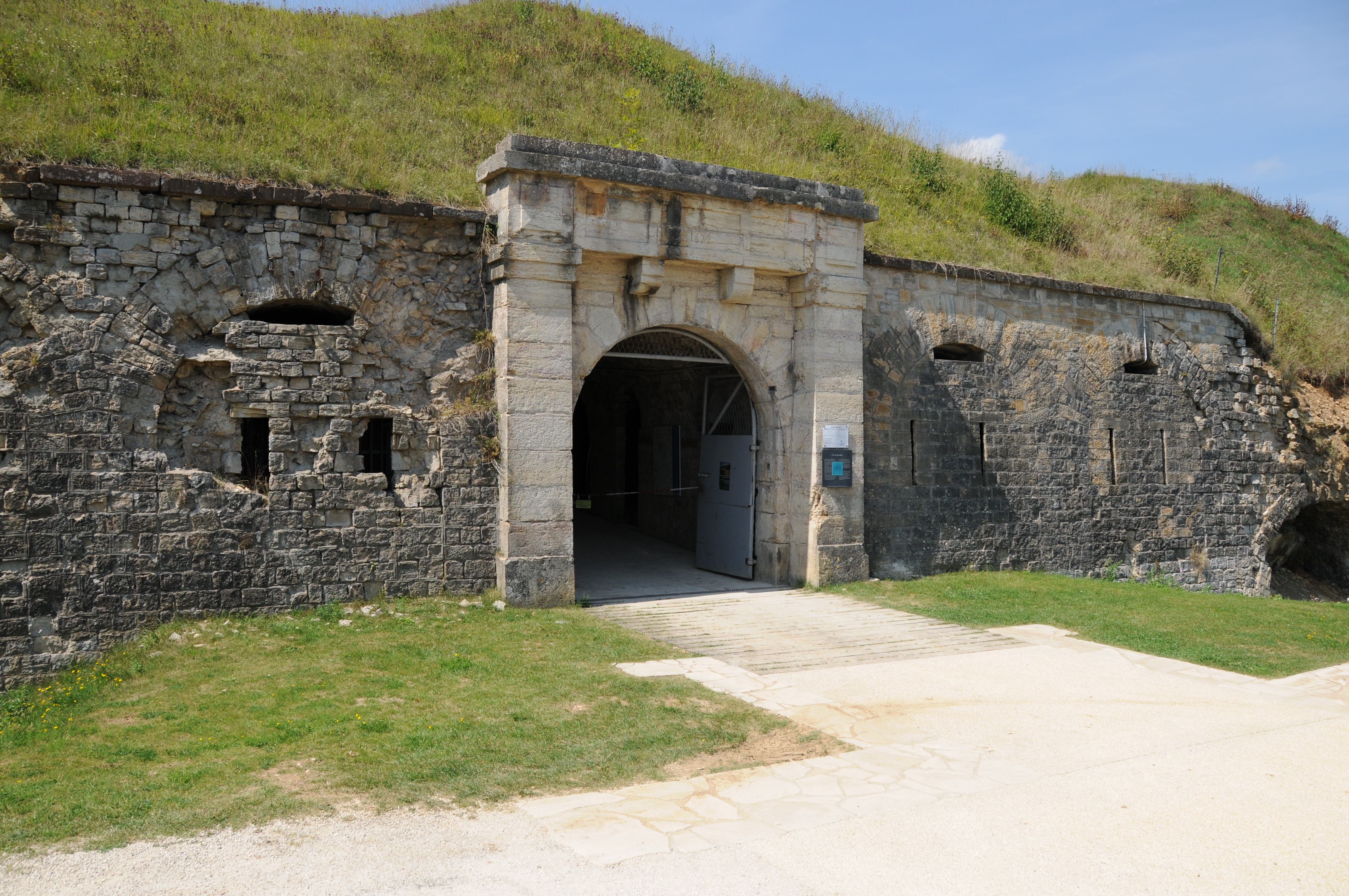 Entrée principale. Bart hill fortifications : main entry.